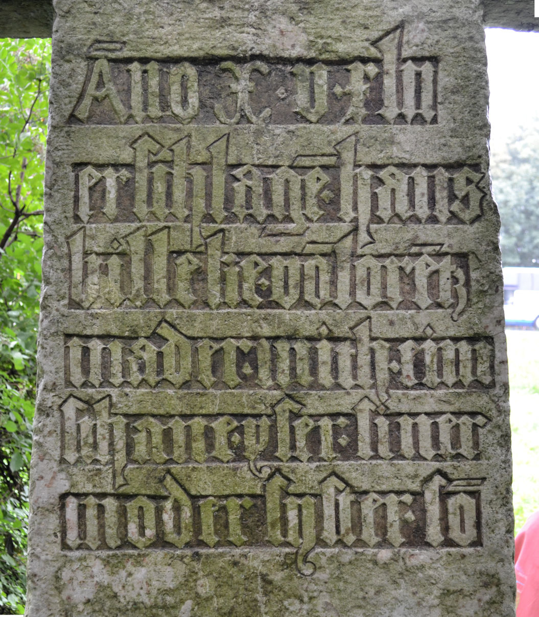 Krzyż pokutny w Stargardzie Szczecińskim